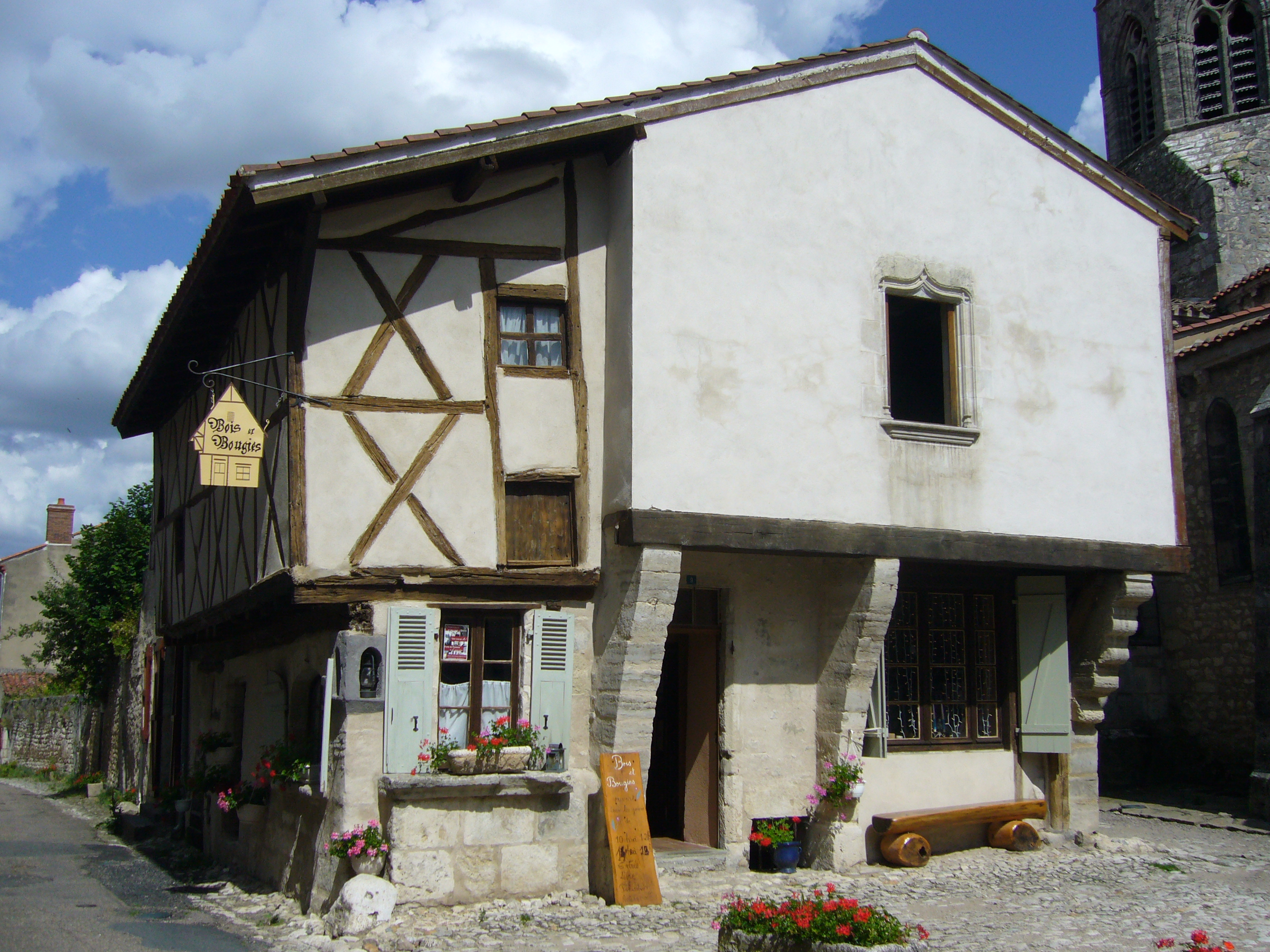 Maison à colombages à Charroux (Allier, France).